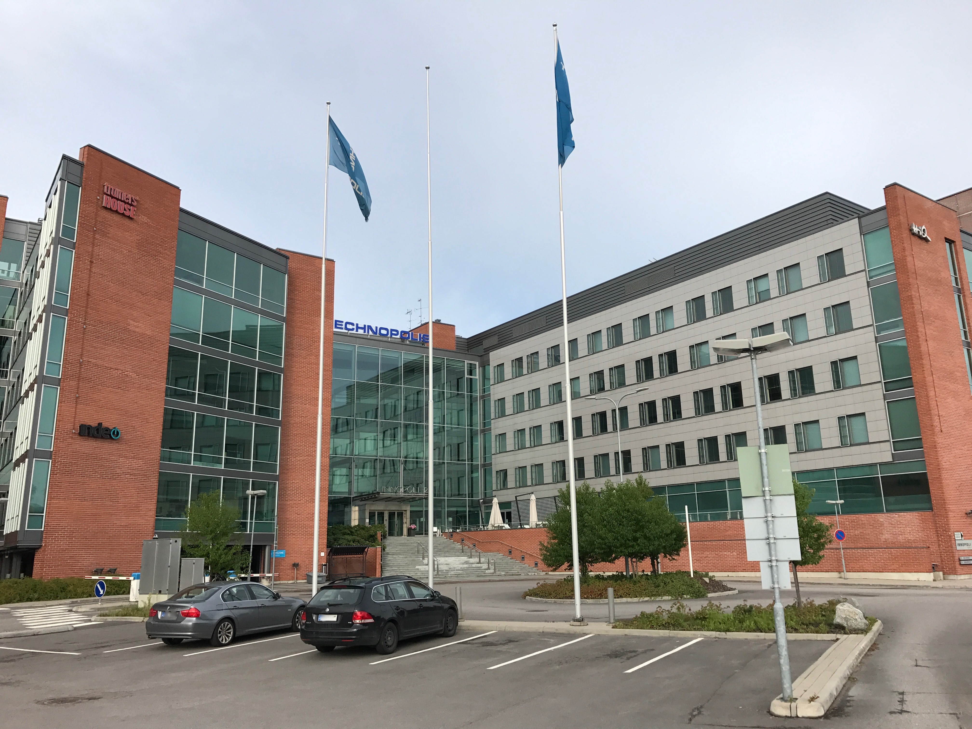 Technopolis Innopoli 2 Espoon Otaniemiessä.